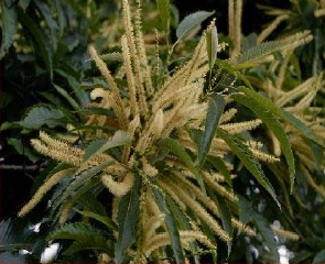 Flor de Castanea sativa.